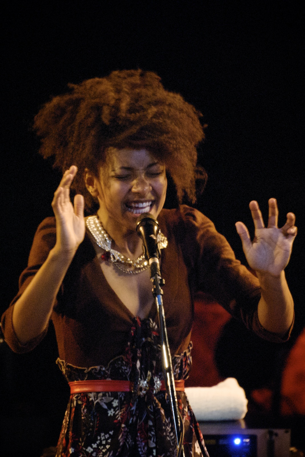 Esperanza Spalding - Concerto del 15 luglio 2009 a Fiesole - Firenze